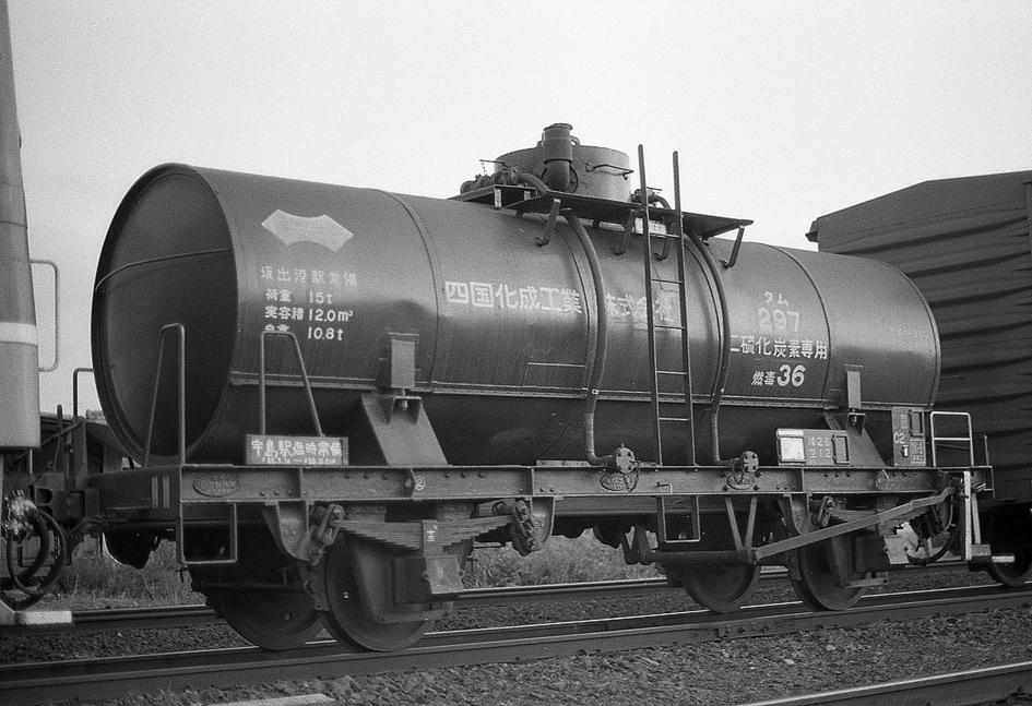 タム200形 タム297